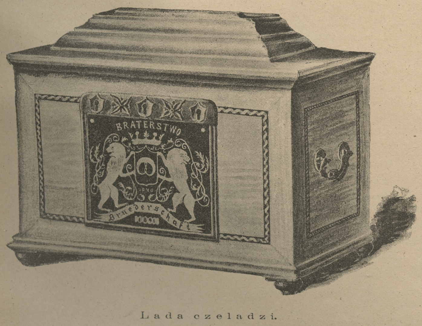 Cech piekarski : Lada czeladzi